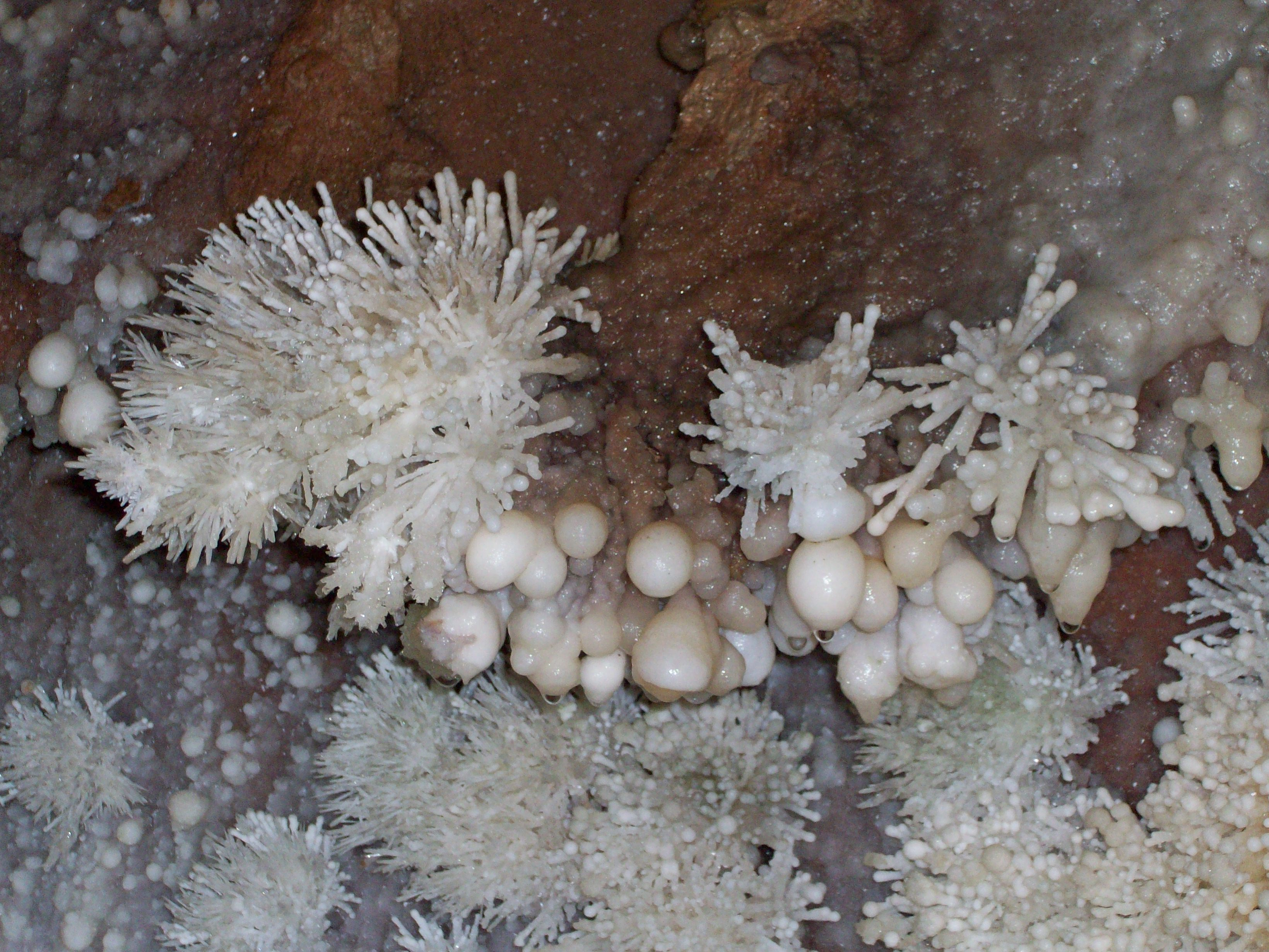 Aragonit „Eisenblüten“ und kugelige Aussinterungen in der Grotte di Toirano